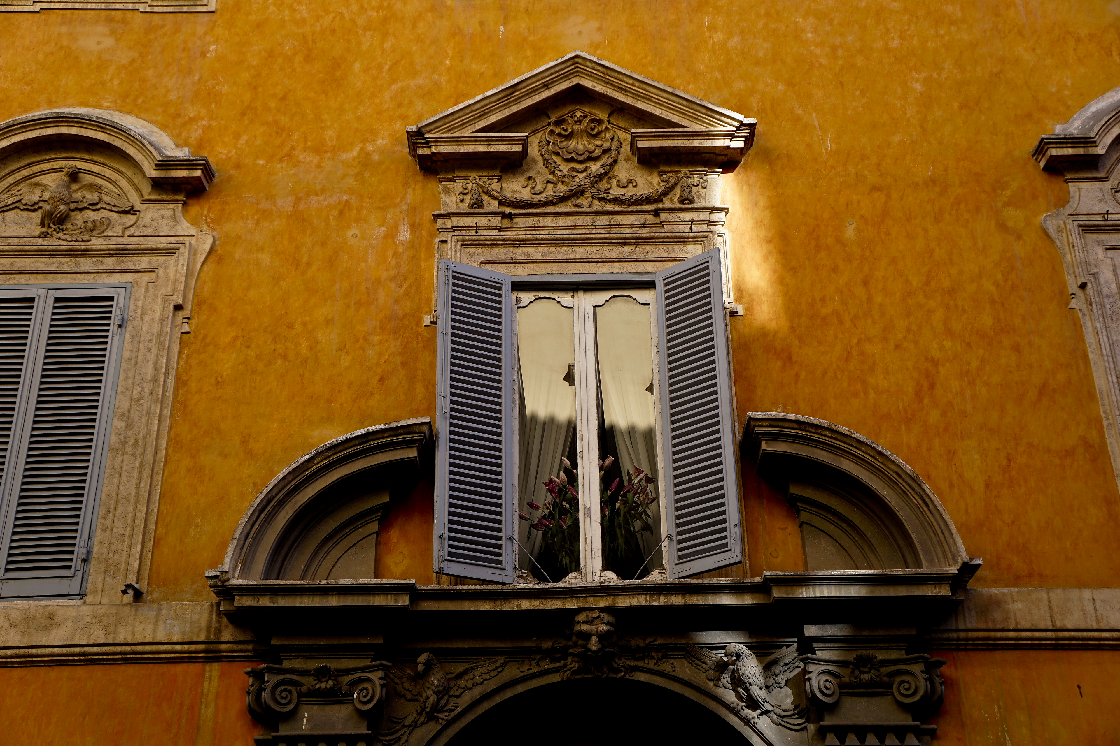 aDSC03959